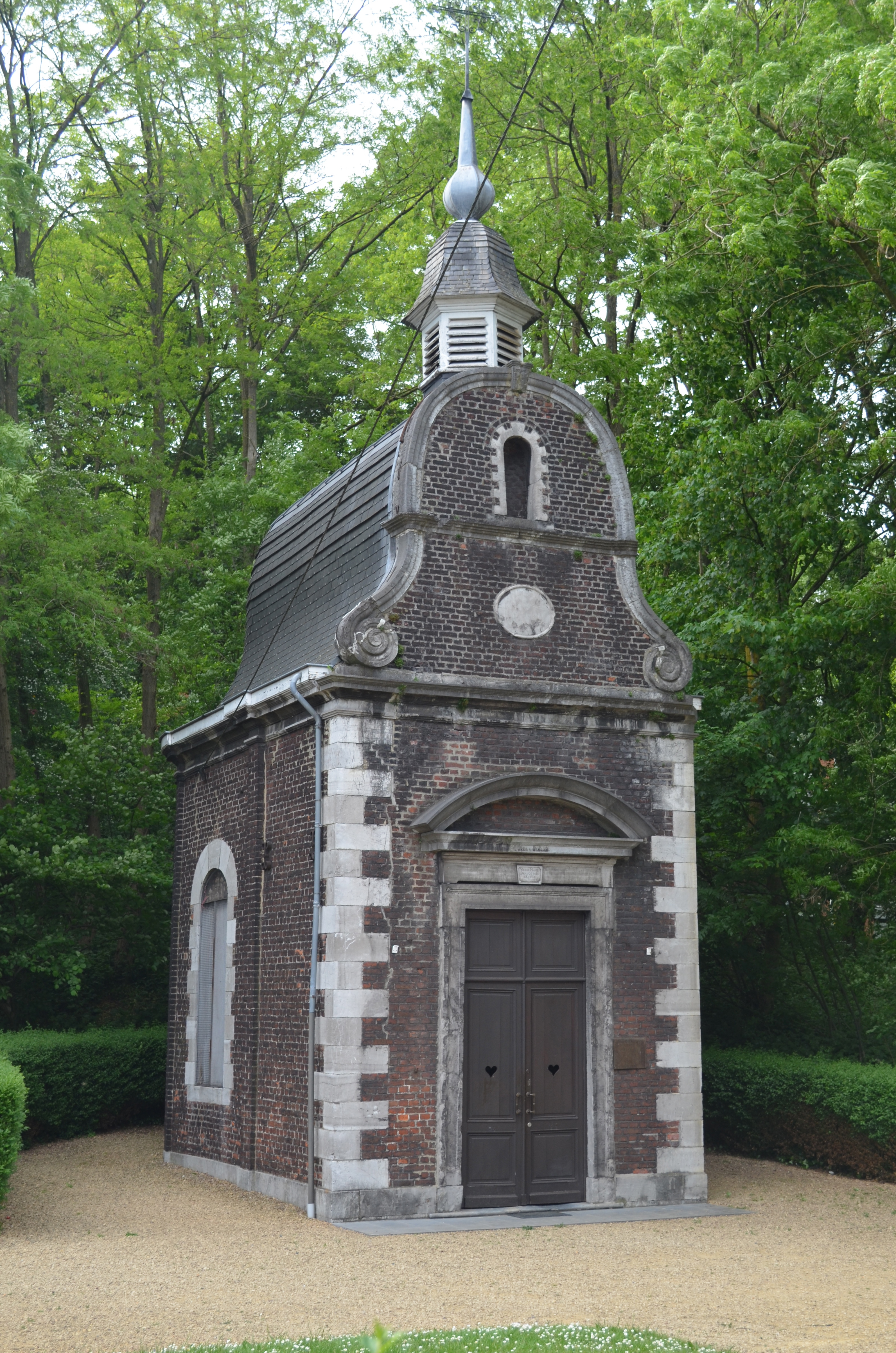 Jumet (Charleroi-Belgique) - Chapelle Notre-Dame au Bois